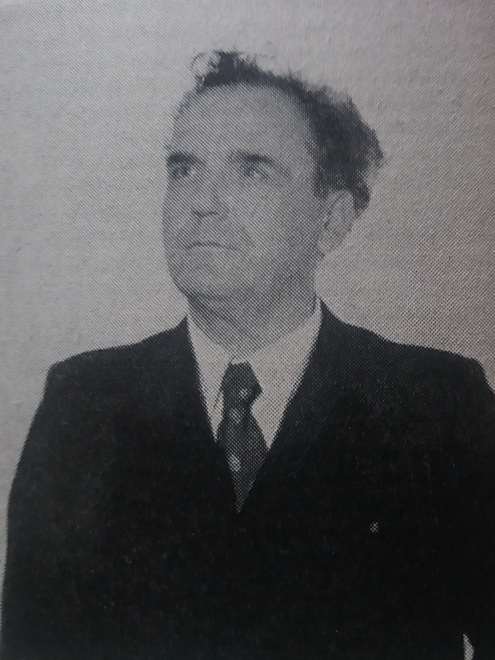 Отсканированная фотография из книги автора.